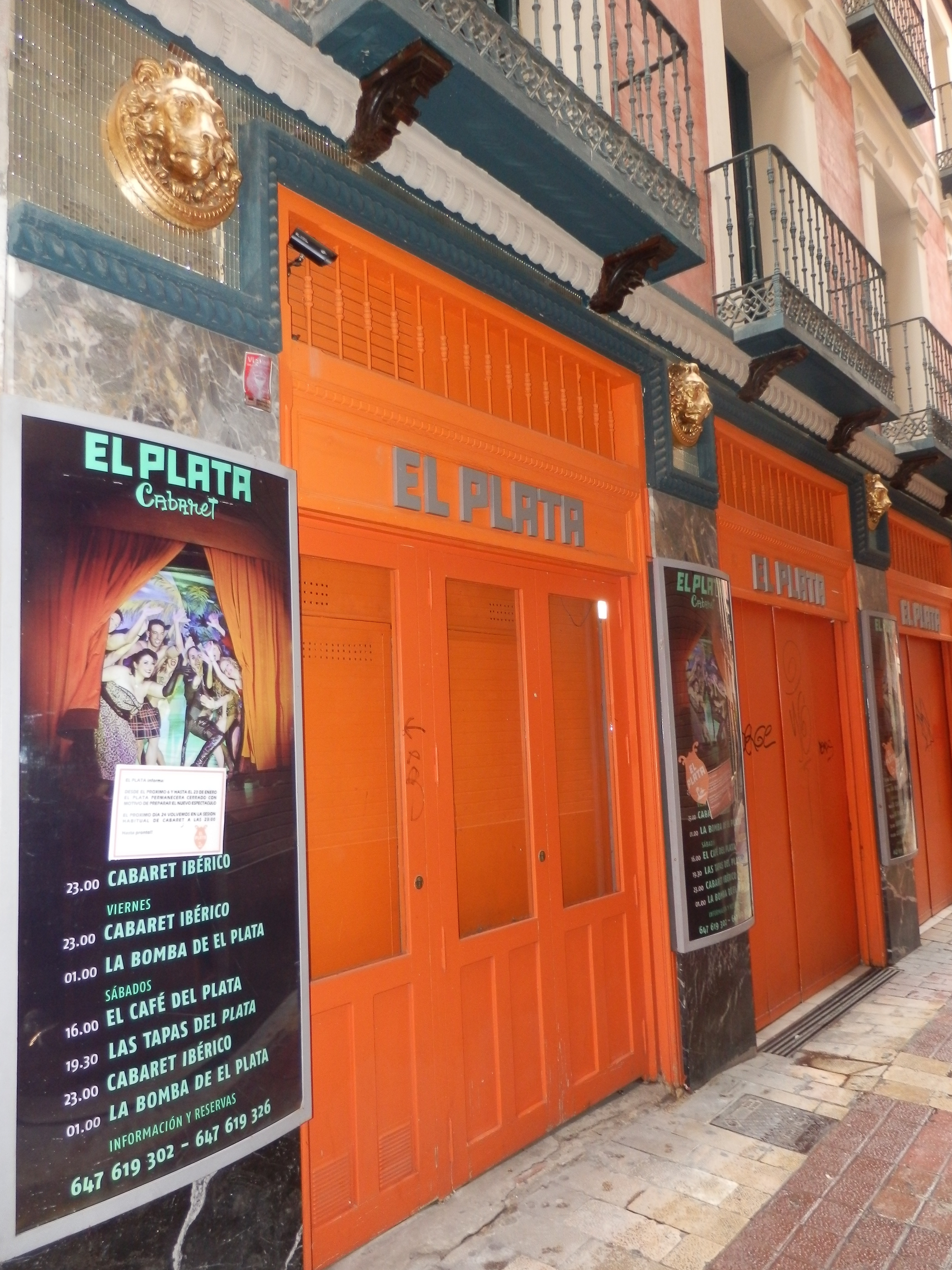 Fachada de "El Plata", café-cantante (cabaret) de Zaragoza (España). Situado en la calle Cuatro de Agosto, 23.